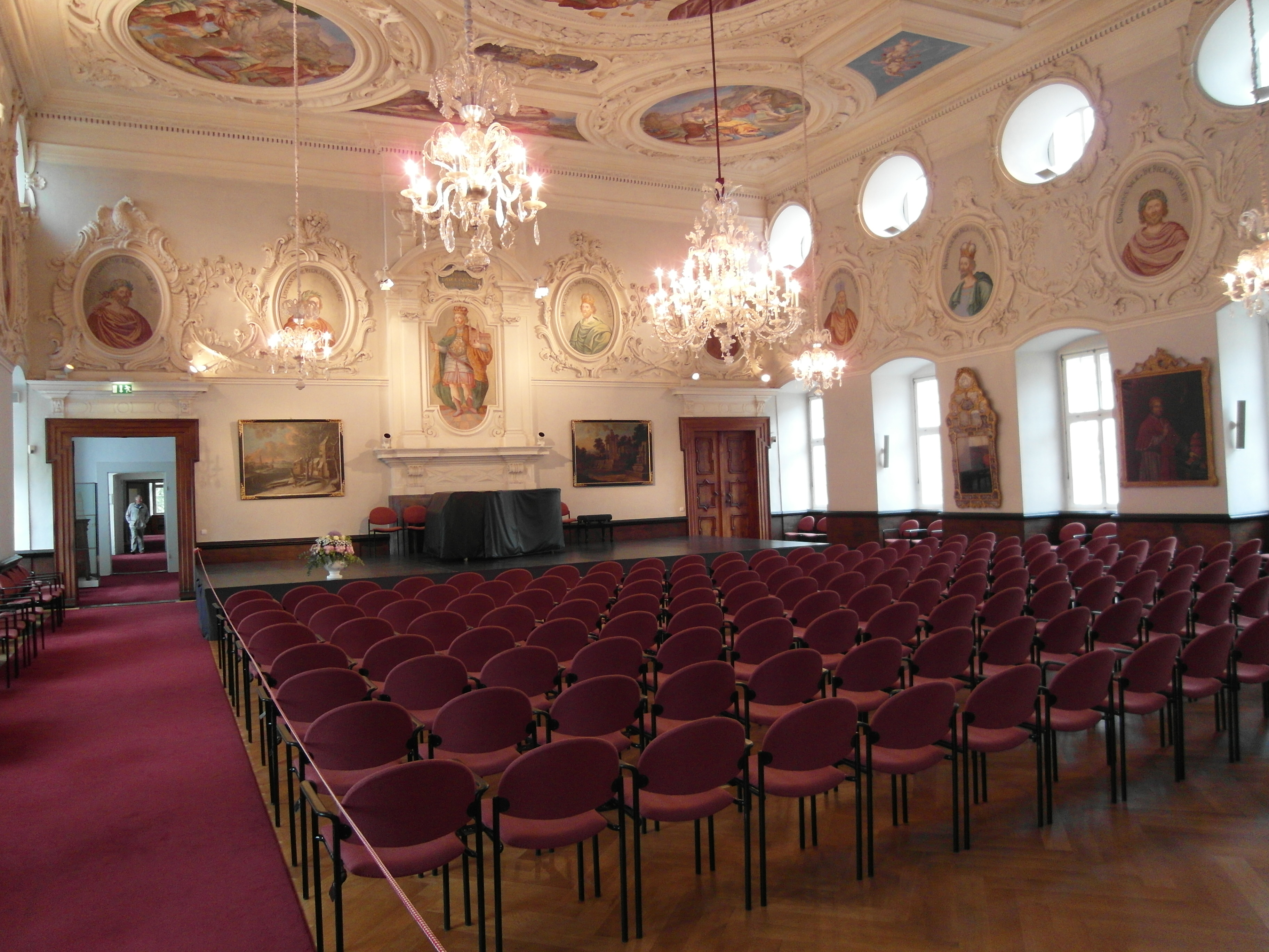 Der Kaisersaal im Westflügel des Schlosses Corvey